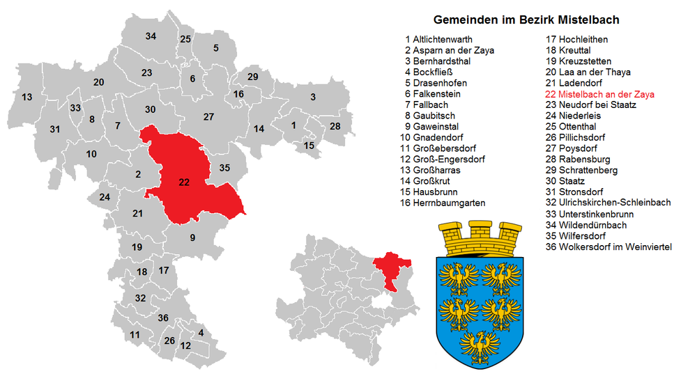 Bezirk Mistelbach